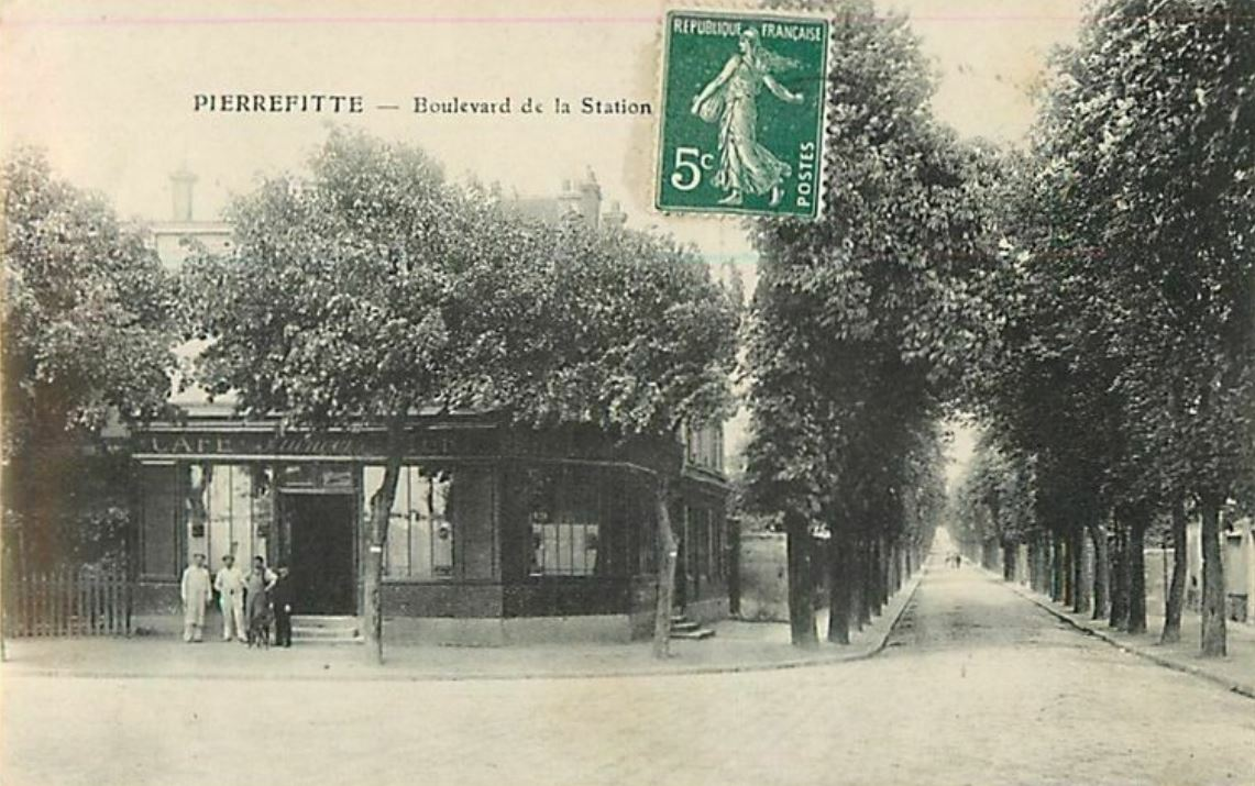 Pierrefitte.Boulevard de la Station.Café